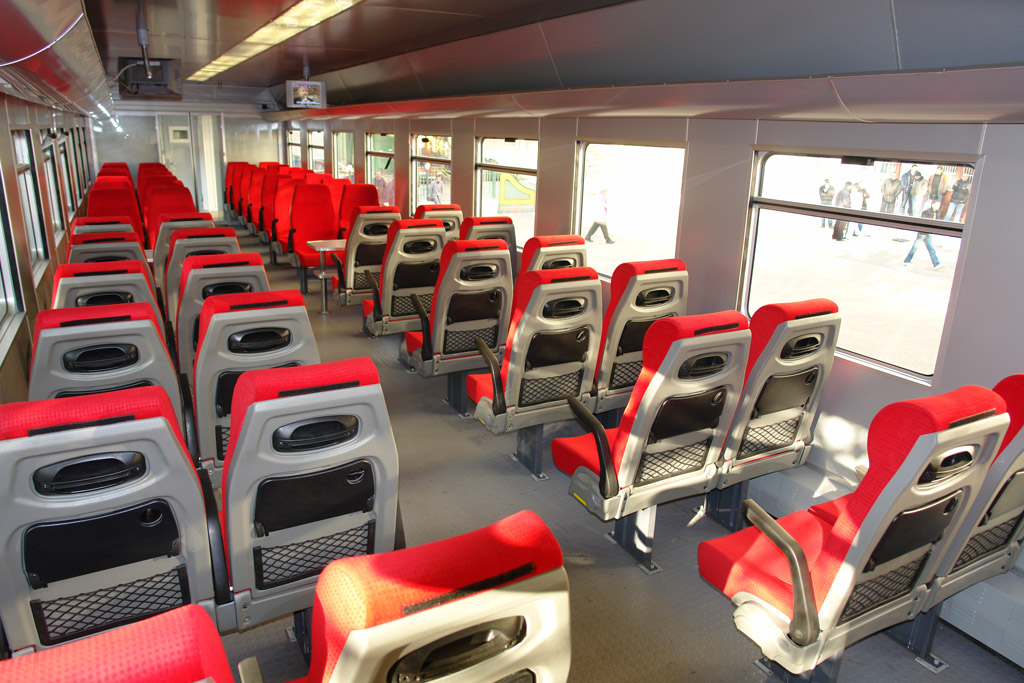 NEW TRAINS GEORGIA 2006 Tbilisi- POTI Express